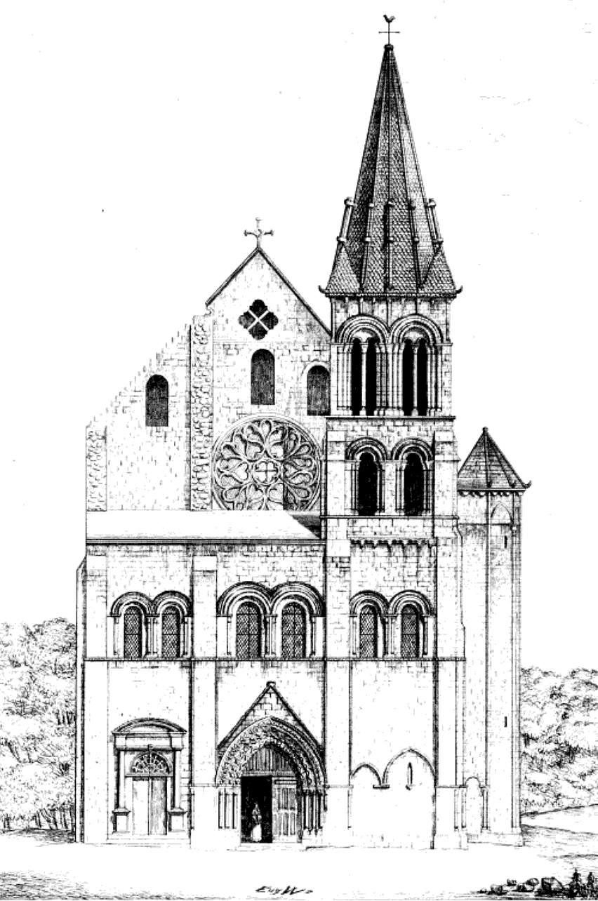 Reconstitution de la façade au XVIIIe siècle.